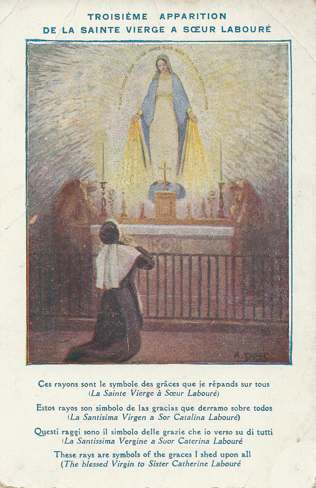 Troisième apparition de la Sainte-Vierge à Sœur Labouré.